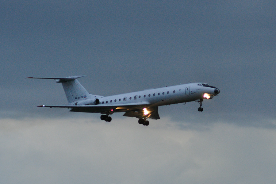 Ту-134А-3 RA-65102 авиакомпании «Центр-Юг» садится на полосу 23 аэропорта Курумоч, г. Самара